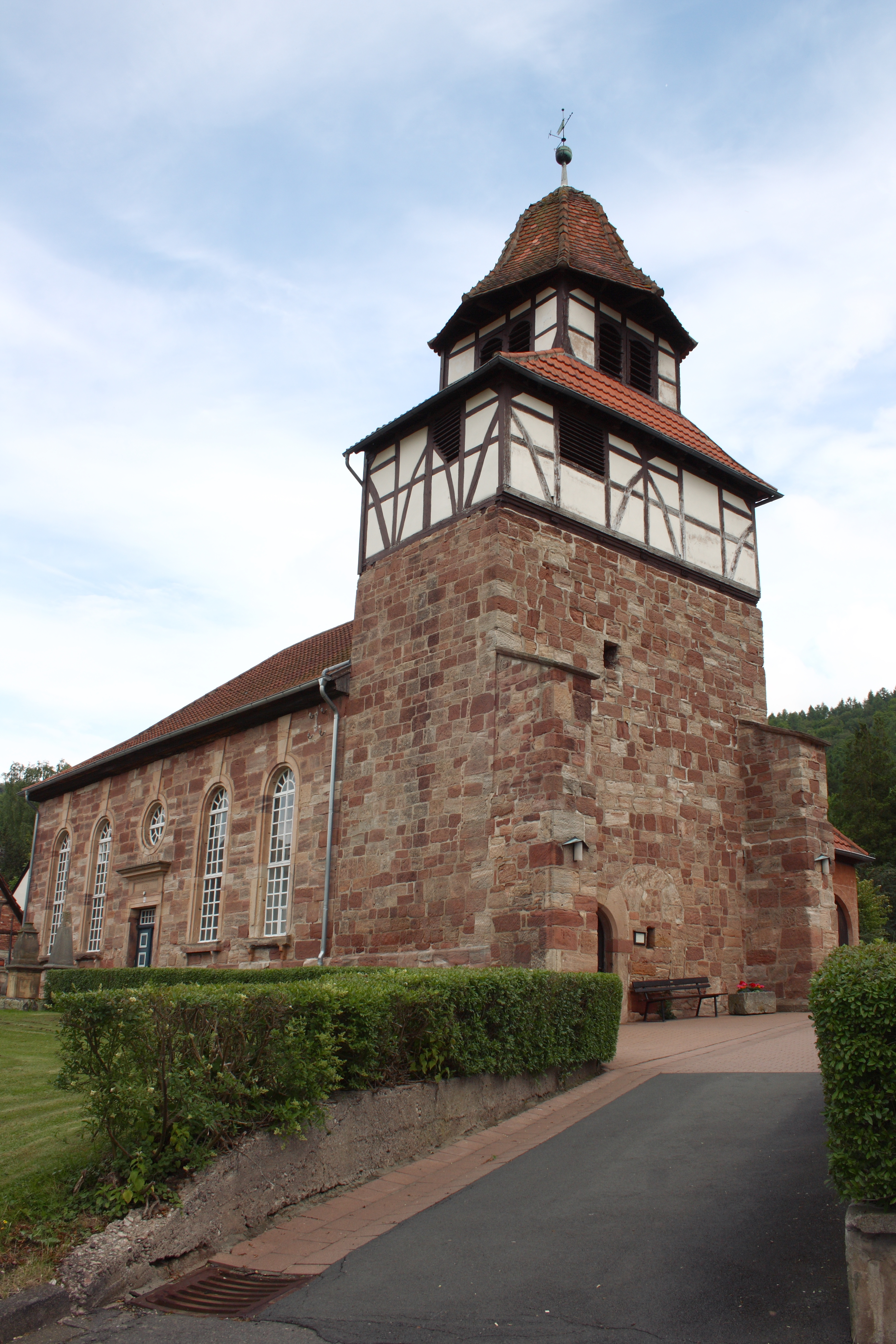 Evangelische Kirche in Aue, einem Ortsteil von Wanfried im Werra-Meißner-Kreis (Hessen), klassizistischer Saalbau mit im Kern mittelalterlichem Westturm mit Fachwerkaufsatz